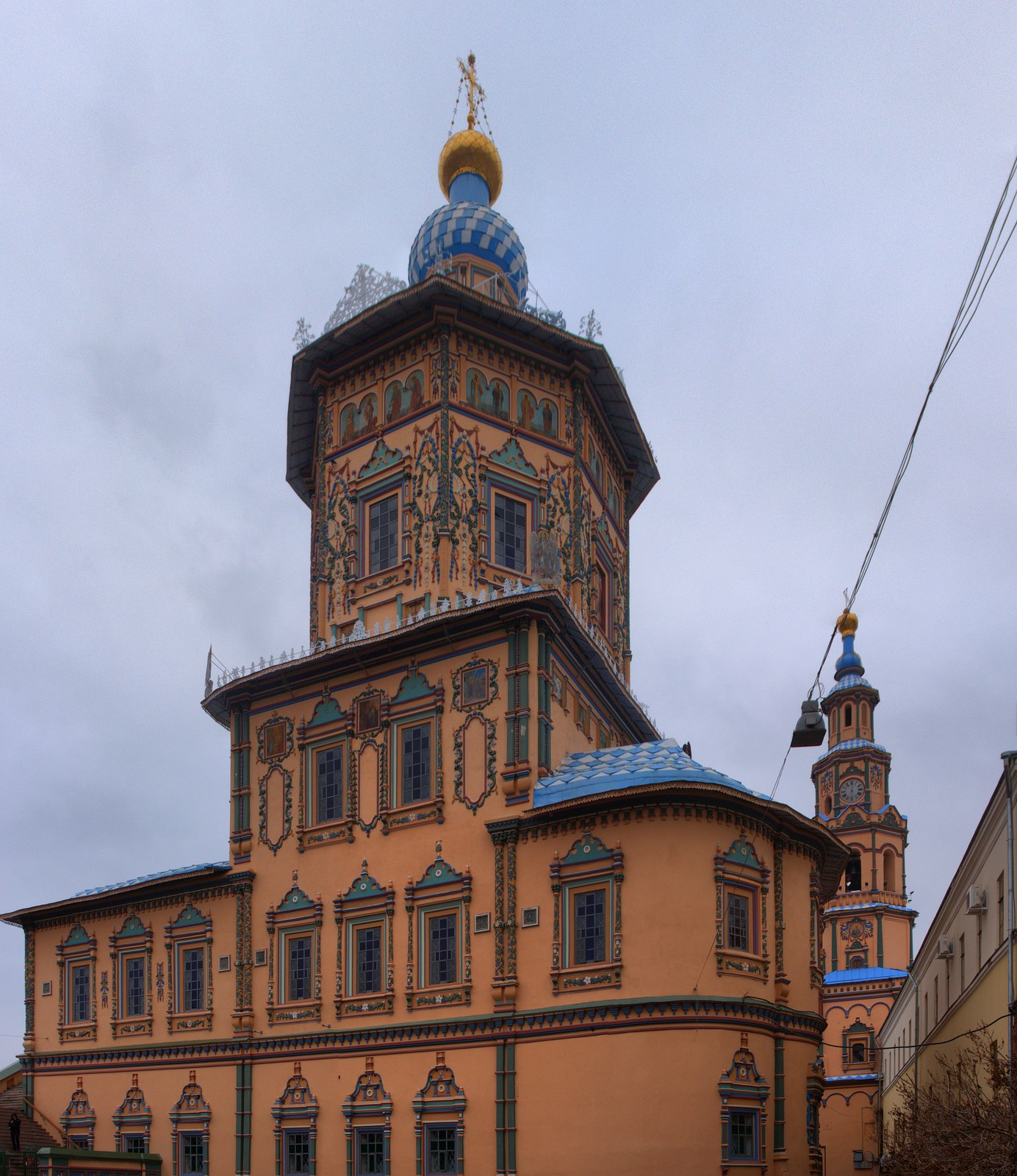 Петропавловский собор, Казань